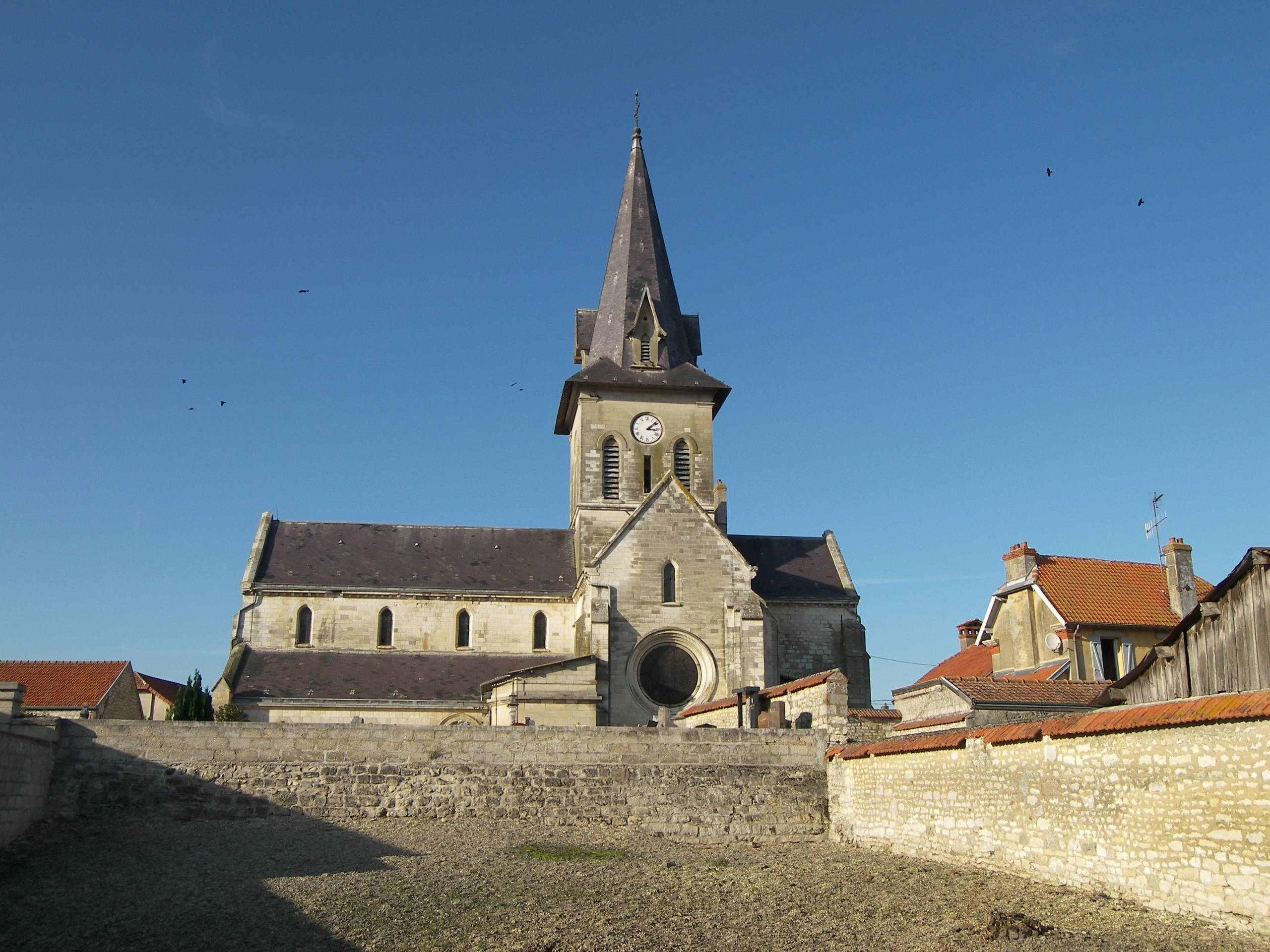 Eglise d'Amifontaine (02)